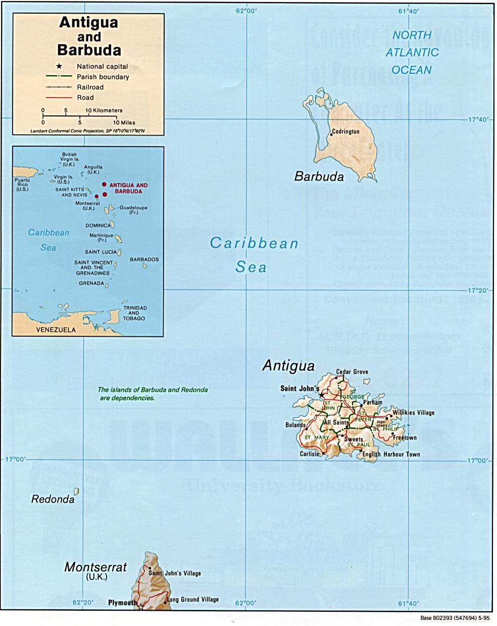 Map of Antigua and Barbuda